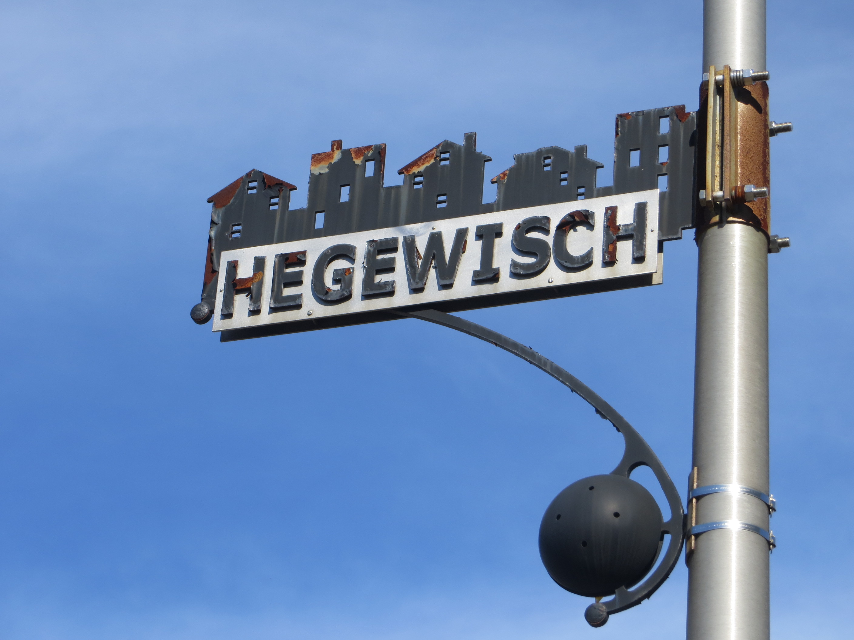 20160220 02 Hegewisch